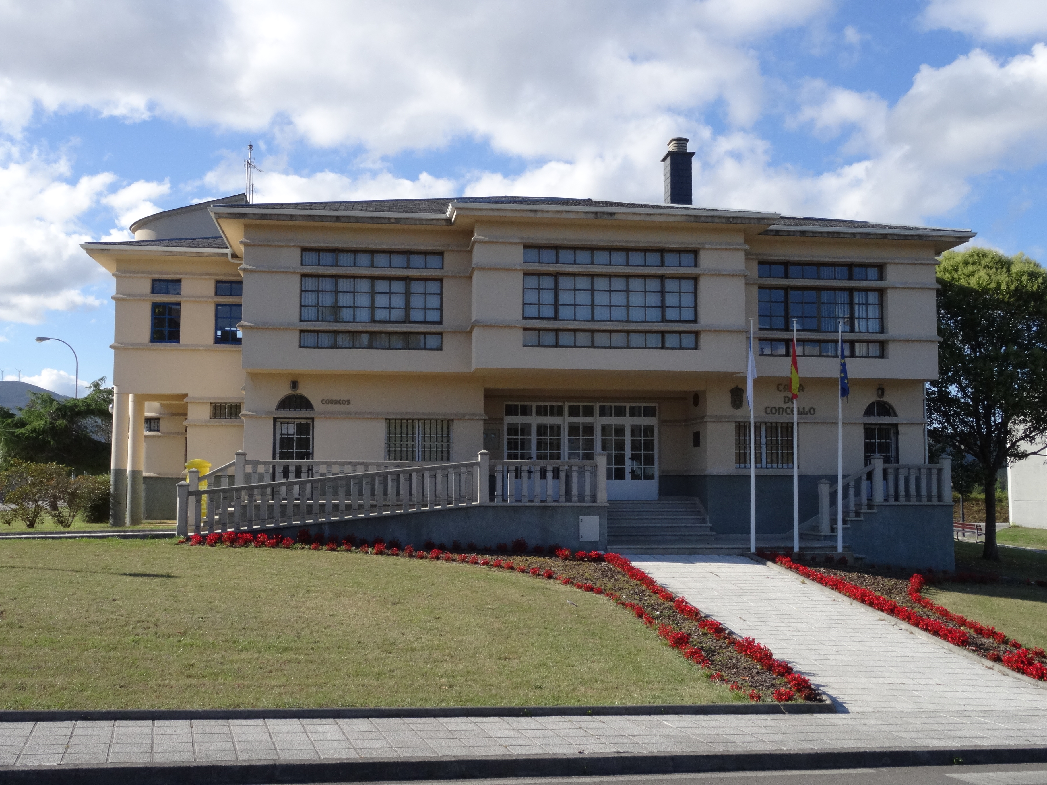 Casa do concello de Alfoz, Lugo.